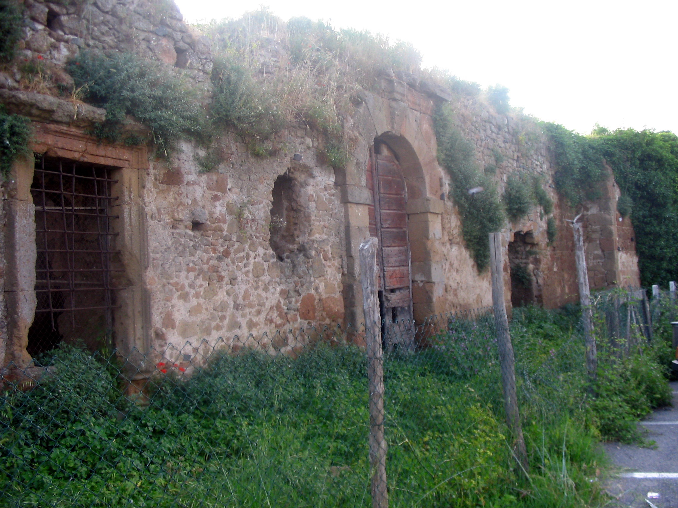 Ardea, Lazio